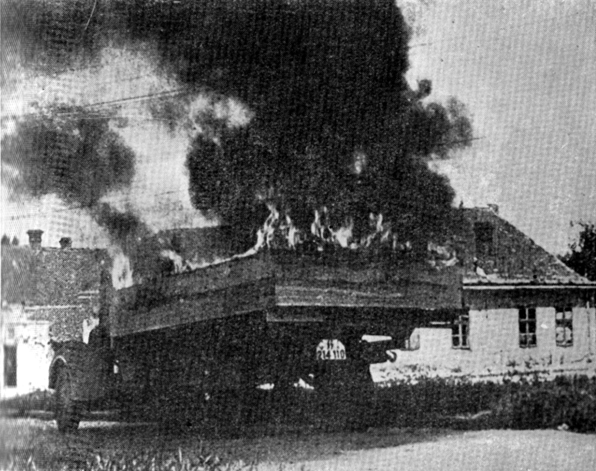 Srpskohrvatski / српскохрватски: Zapaljeni nemački kamion od strane diverzanata u Beogradu u leto 1941.